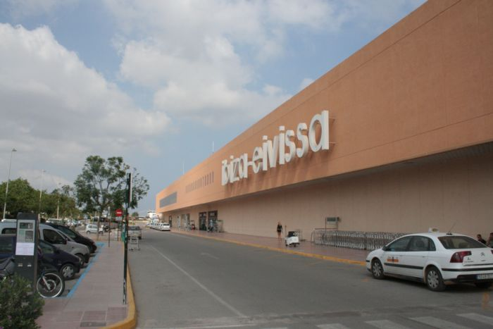 Ibiza airport